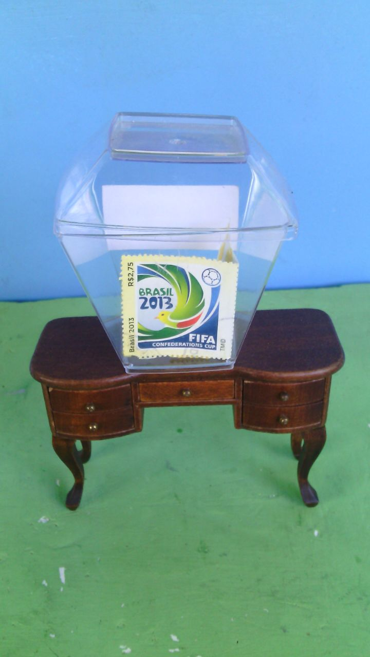 Mini móvel da Planeta DeAgostini encimada com um expositor em plástico, formato diamante, guardando o selo do correio do Brasil sobre a Copa das Confederações FIFA de 2013.